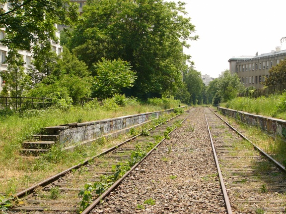 Chemin de fer de Petite Ceinture, Platforms